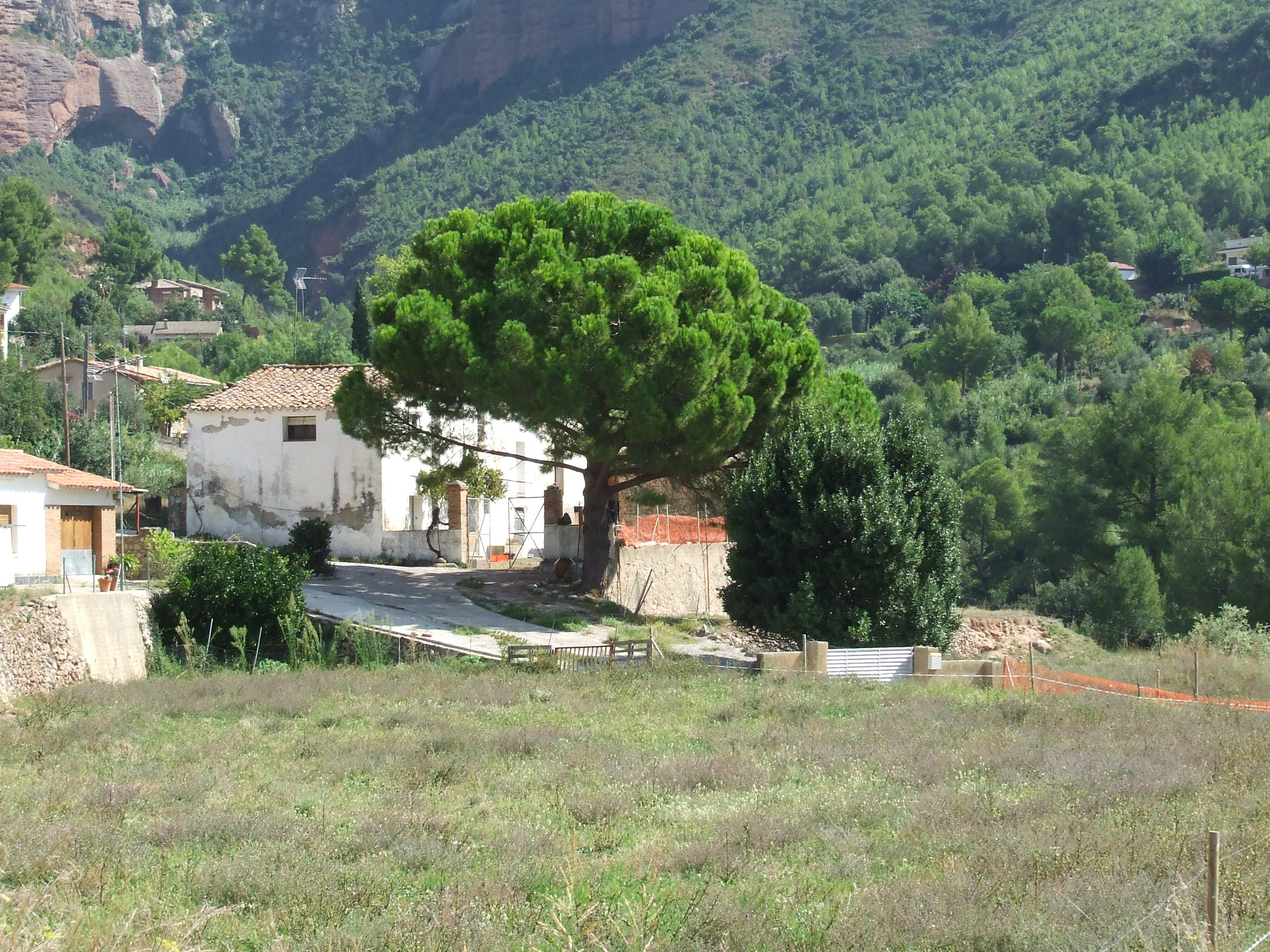 Can Peric (Riells del Fai, Bigues i Riells, Vallès Oriental)